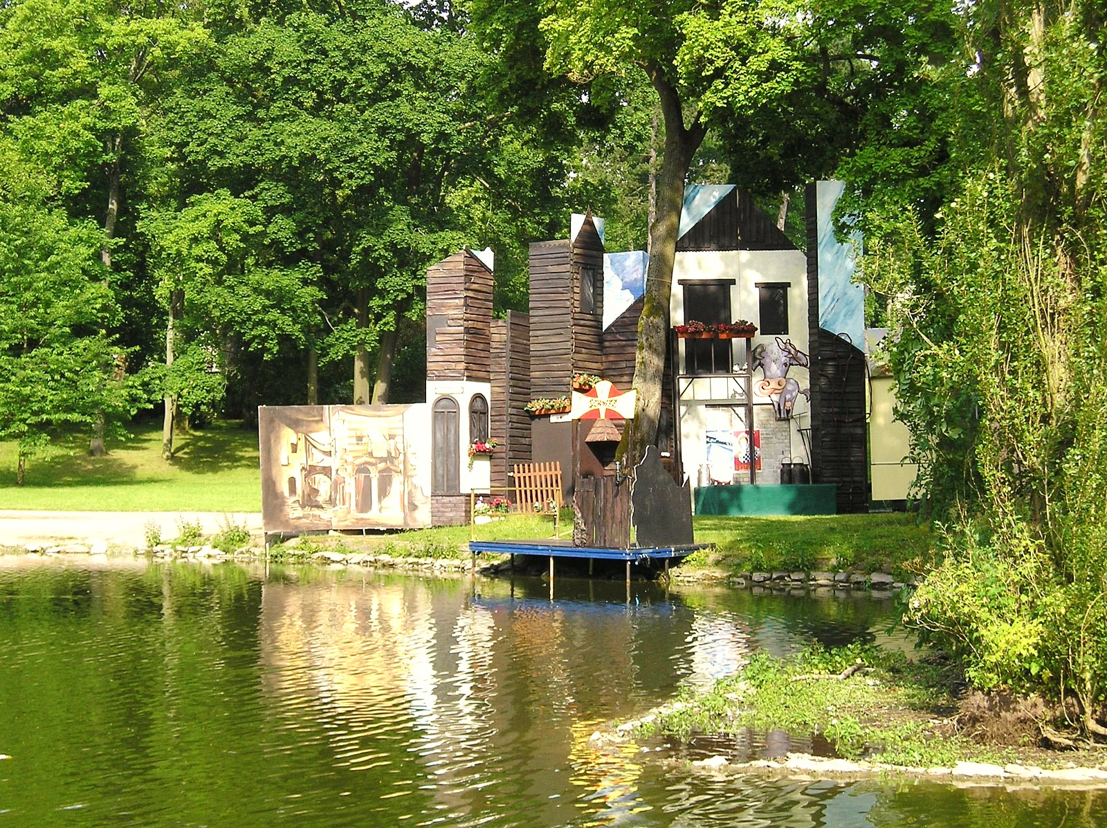 Anlegestelle „Schwyz“ mit Restauration am Ostufer des Großen Teichs im Englischen Garten Meiningen, ein „Ausflugsziel“ für die Festgäste beim Sommerfest des Meininger Theaters 2009, nur zu erreichen mit einer Bootsfahrt.